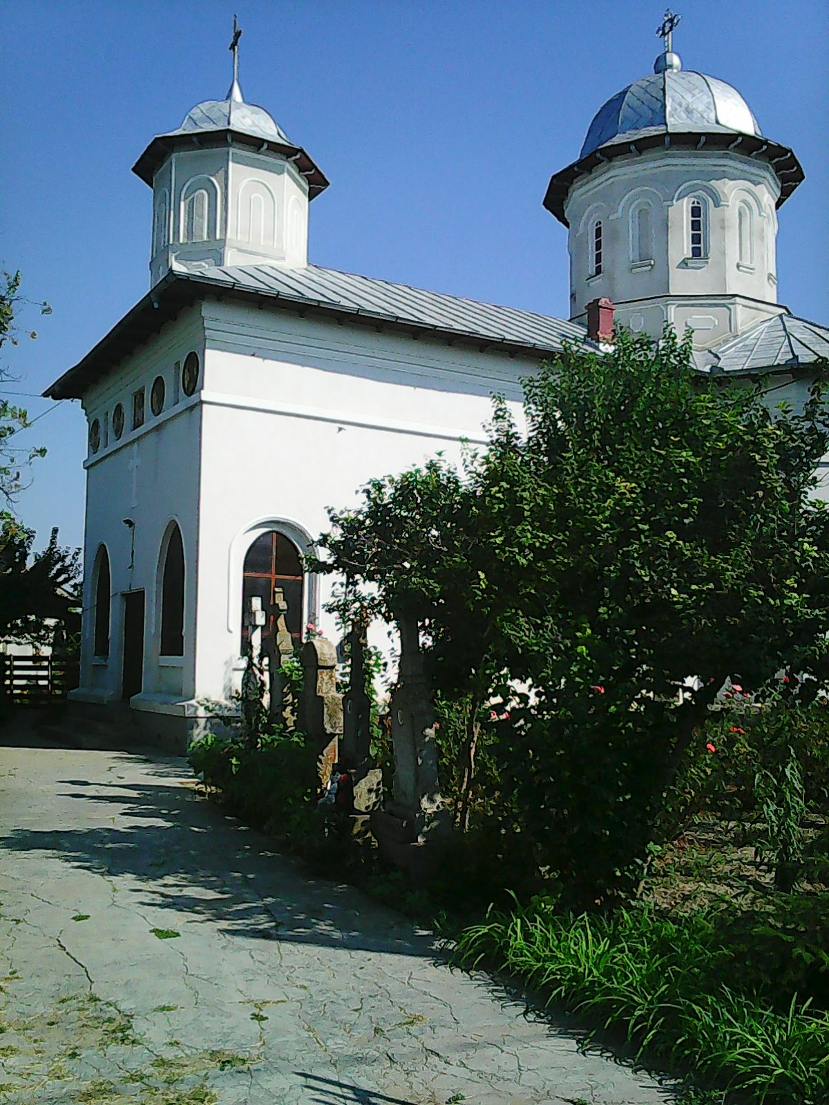 Biserica "Sfantul Ierarh Nicolae" din Rasa, construita intre 1936-1937 pe acelasi amplasament cu o biserica mai veche, din secolul XIX, de la care a preluat catapeteasma.